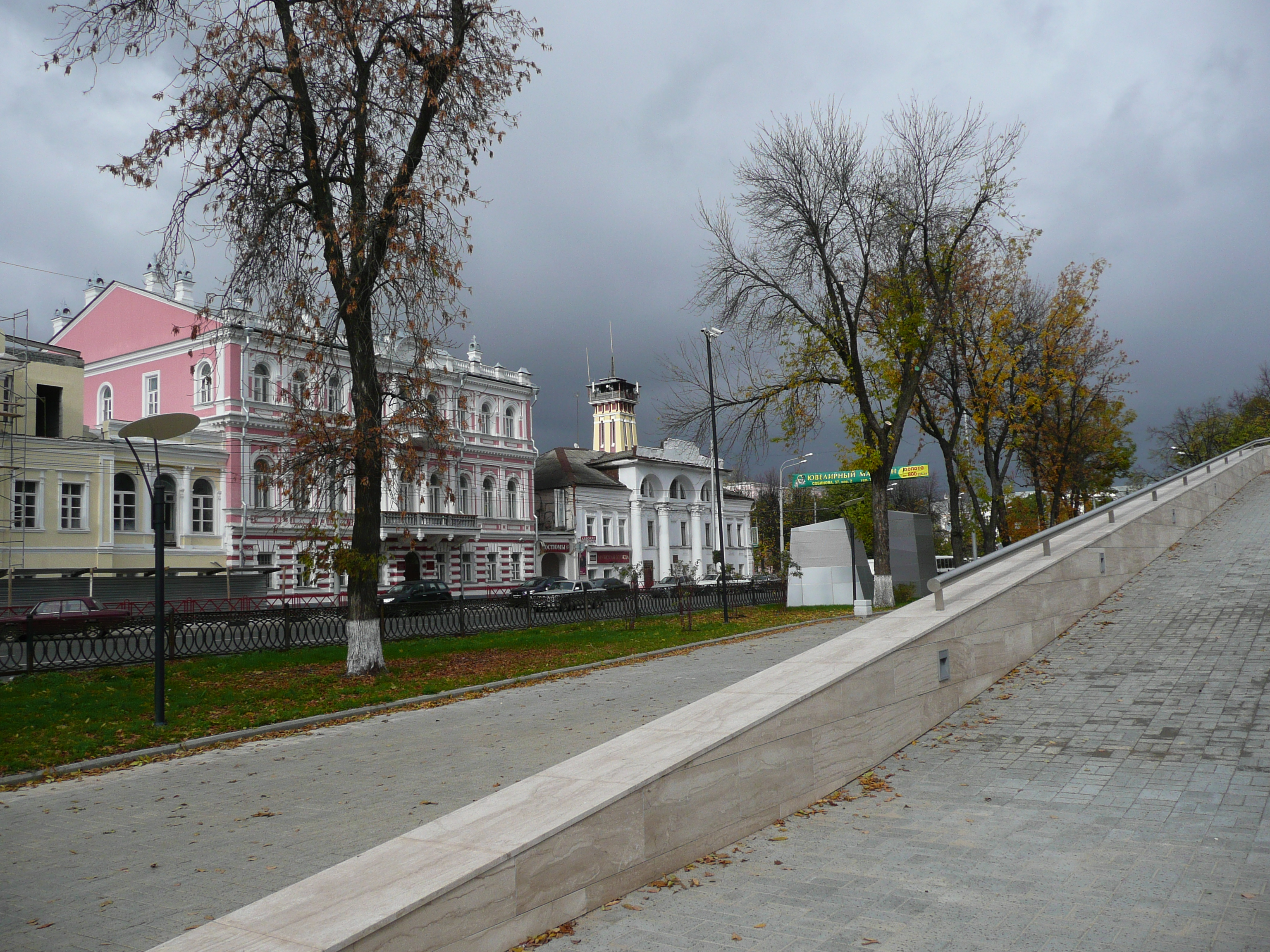 Улица Ушинского в Ярославле (бывш. Стрелецкая)